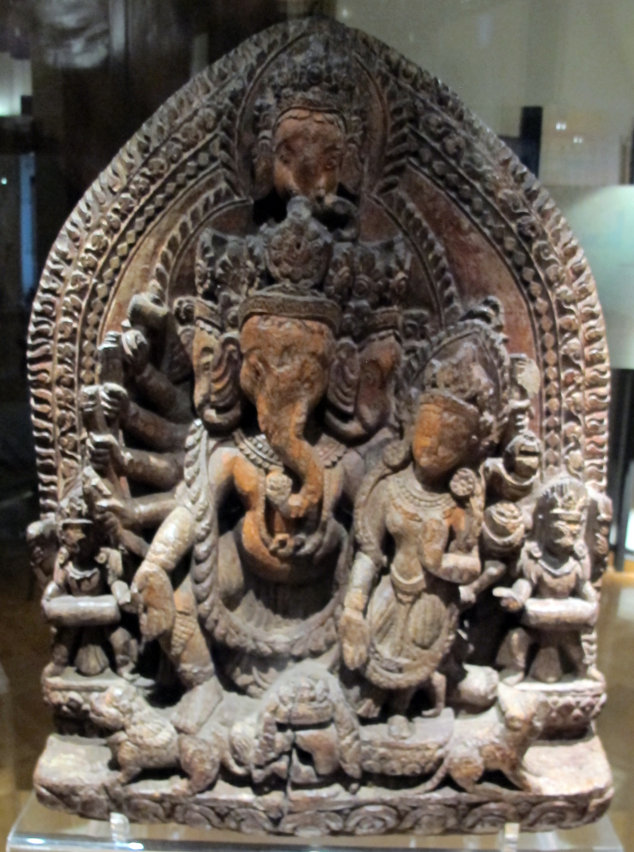 Nepal, ganesha, xviii sec